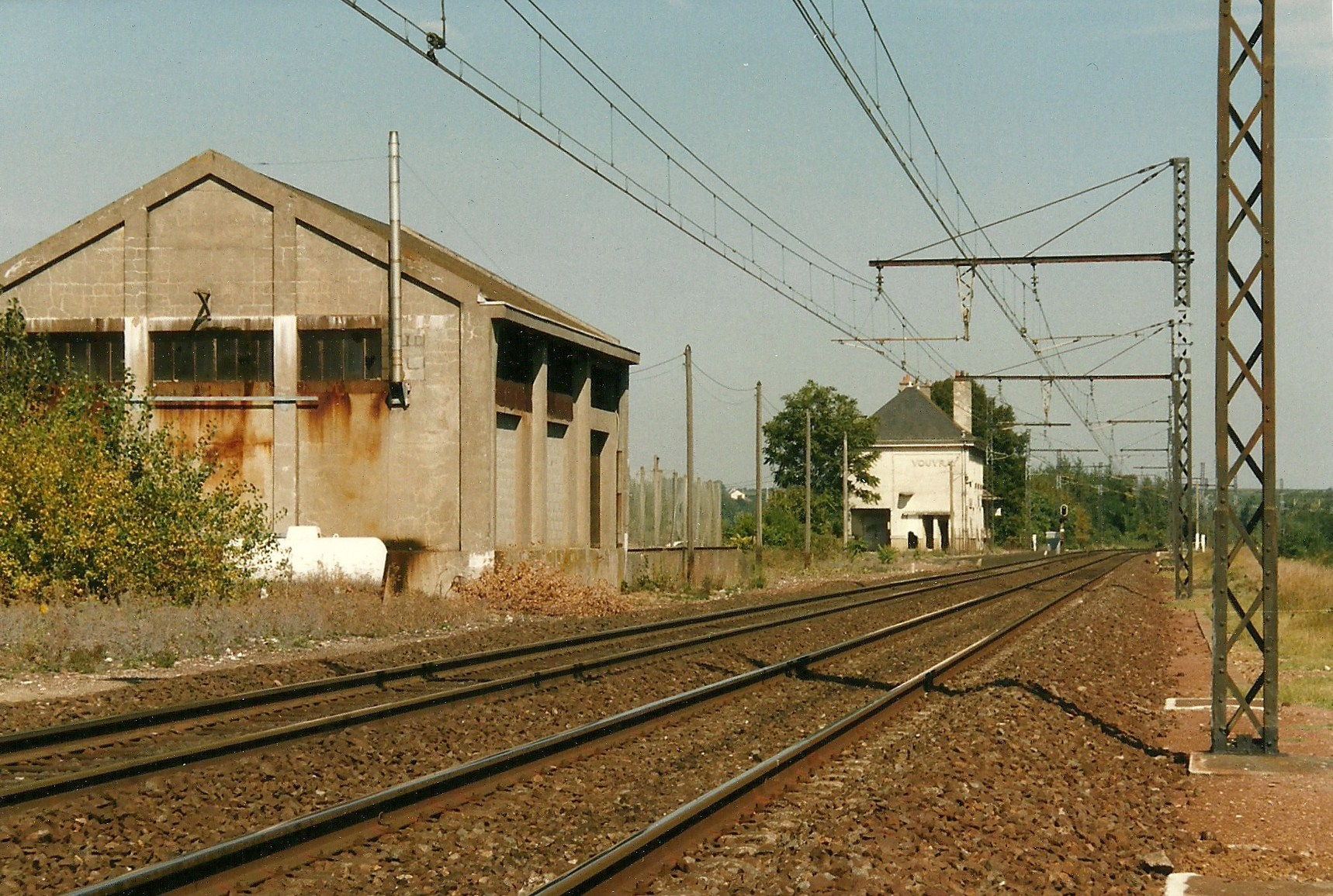 La gare de Vouvray et la halle marchandises